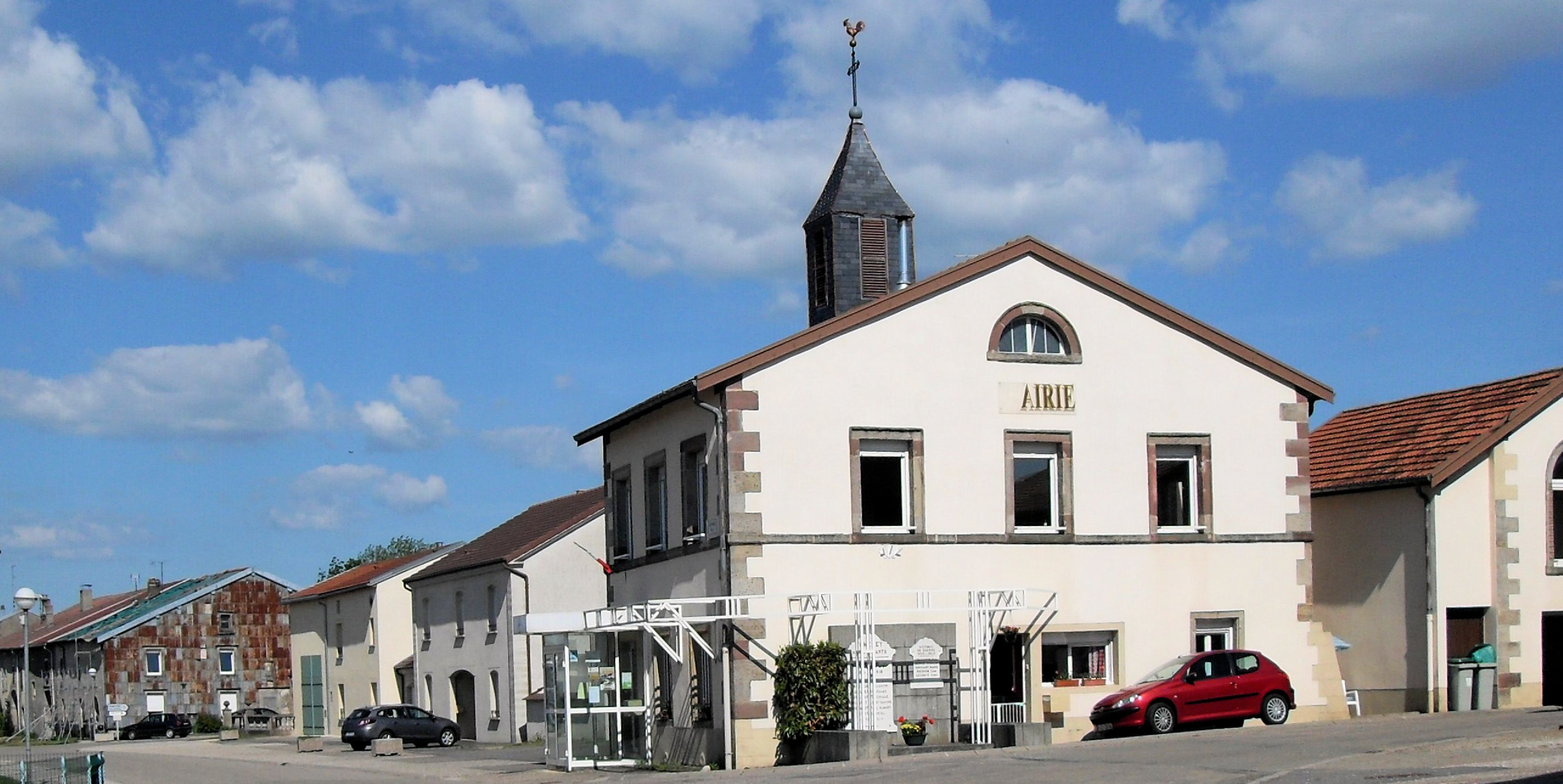 La mairie de Fomerey